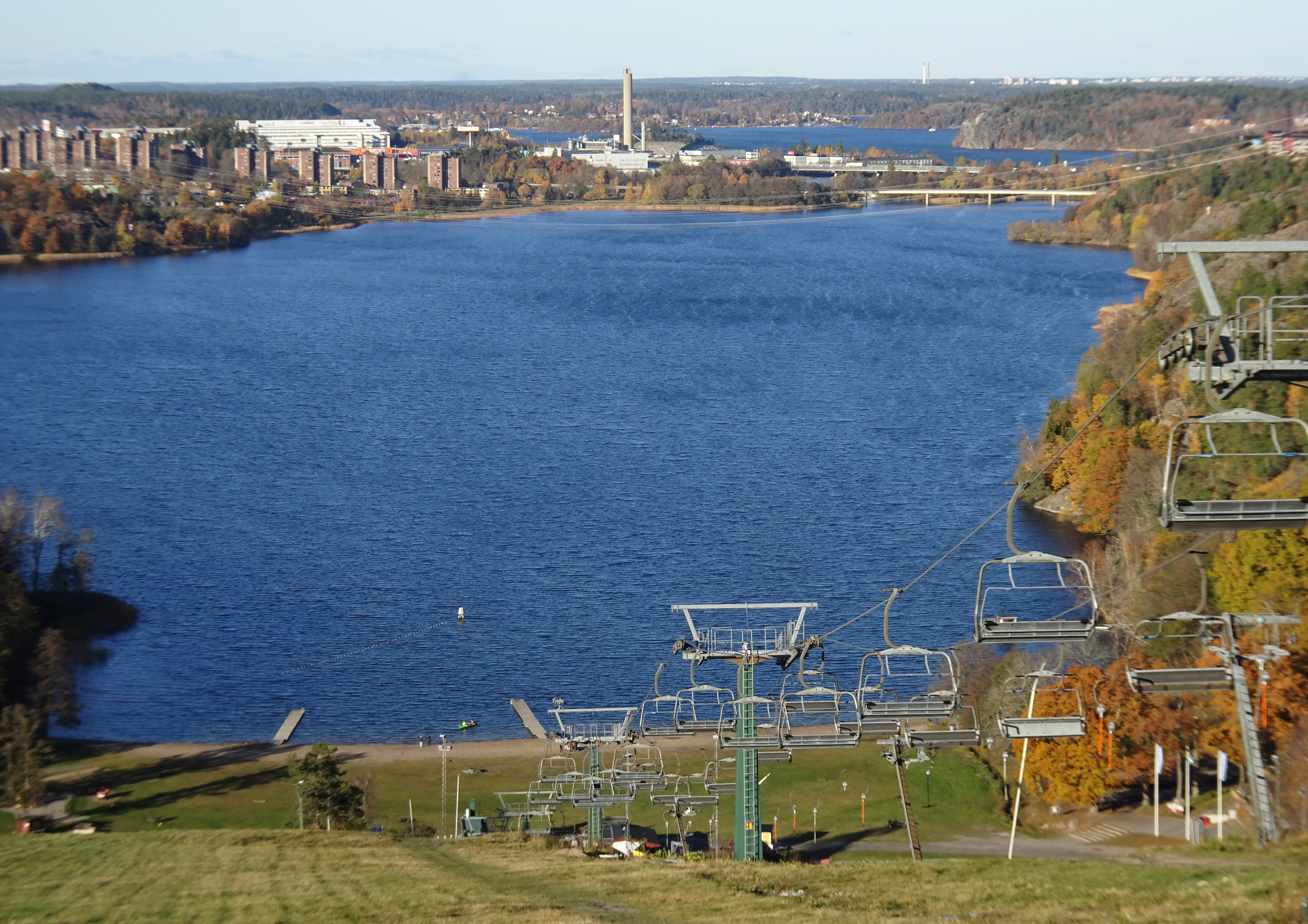 Albysjön